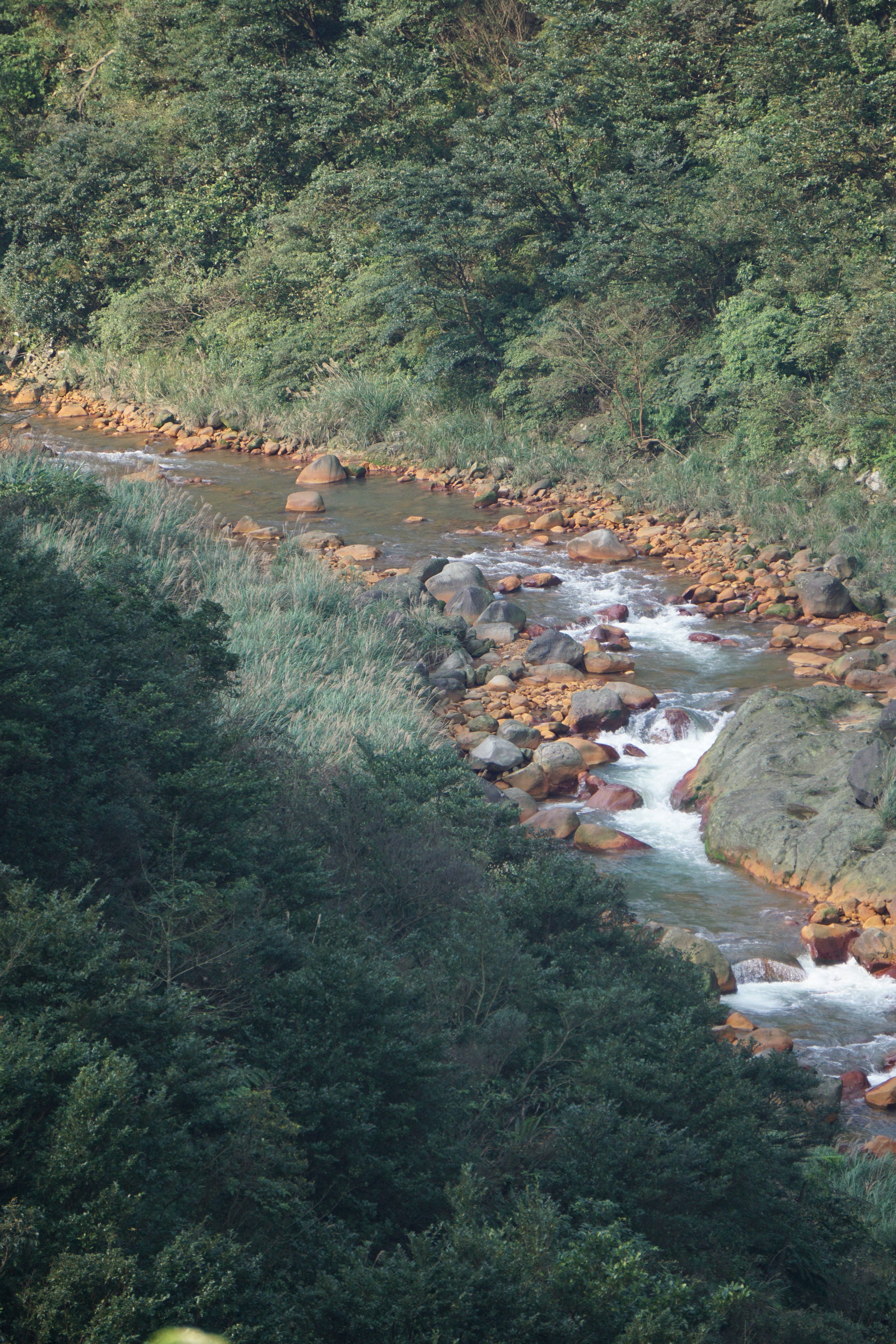 磺渓 (新北市)（強薪付近より撮影）